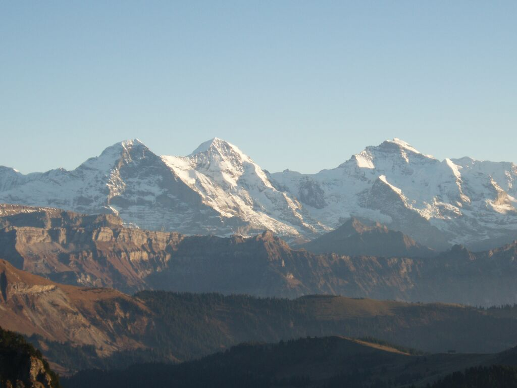 Eiger, Mönch und Jungfrau (Berner Alpen) im Abendlicht fotografiert vom Hohgant